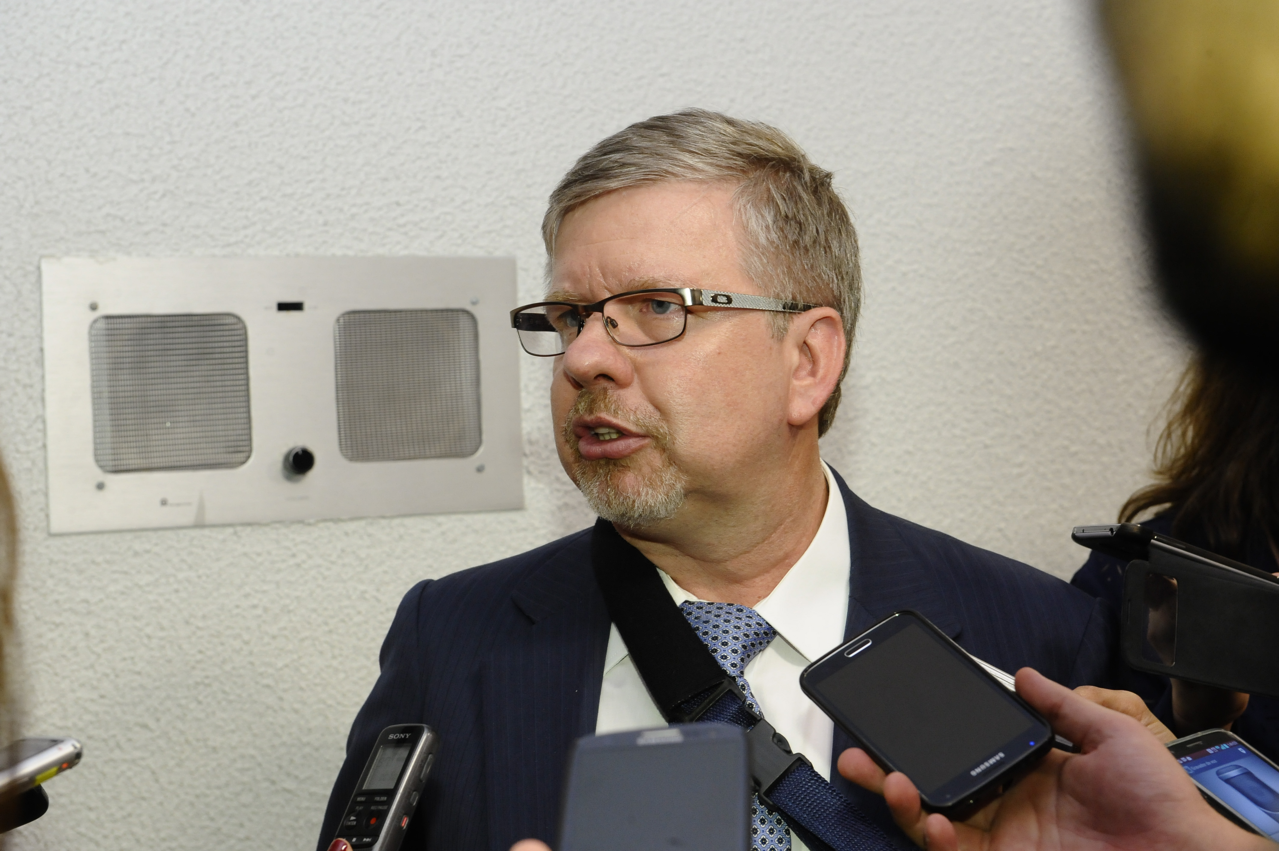 Deputado Marco Maia (PT-RS) concede entrevista nas dependências do Senado. Foto: Waldemir Barreto/Agência Senado